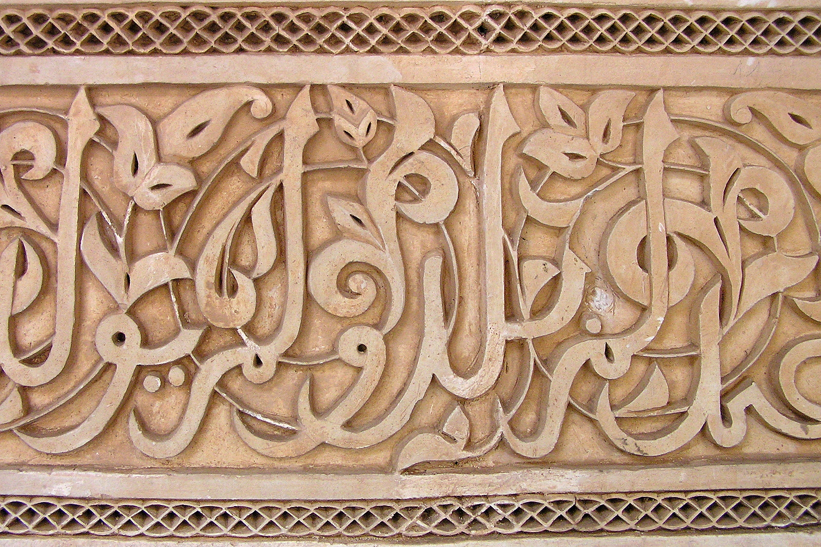 Ornamental element